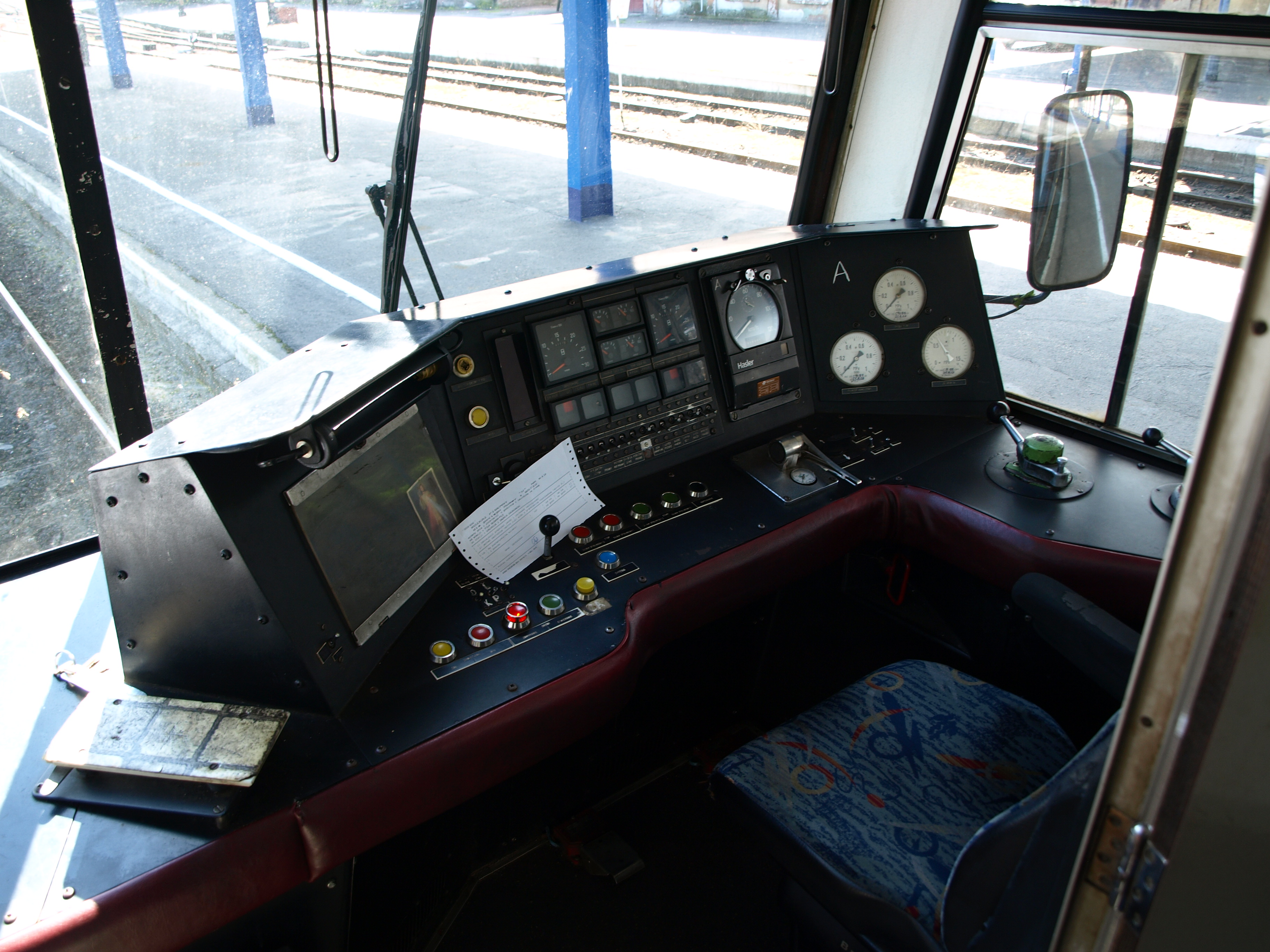 Kabina SA102-003.